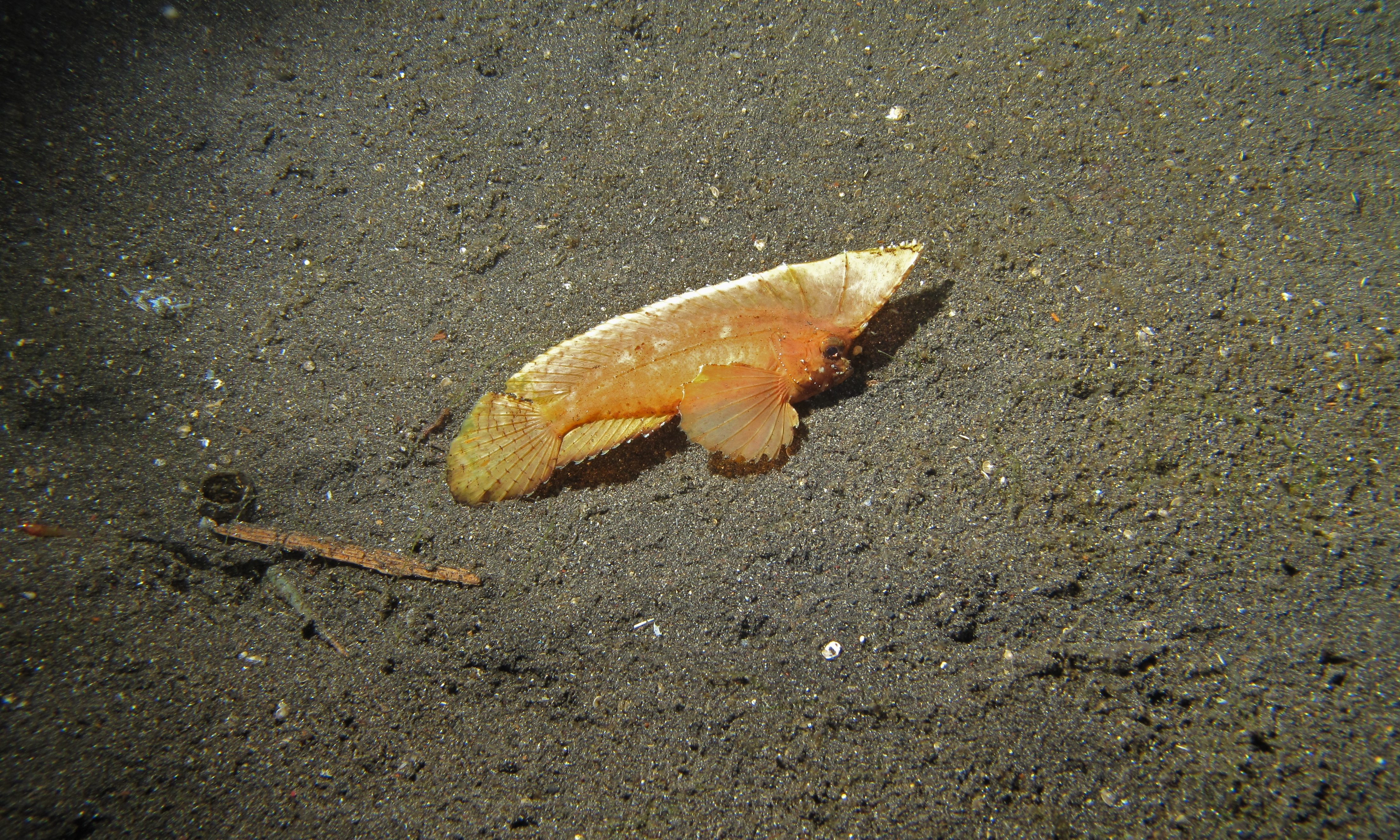 Makawide, Lembeh Strait, Sulawesi, INDONESIA